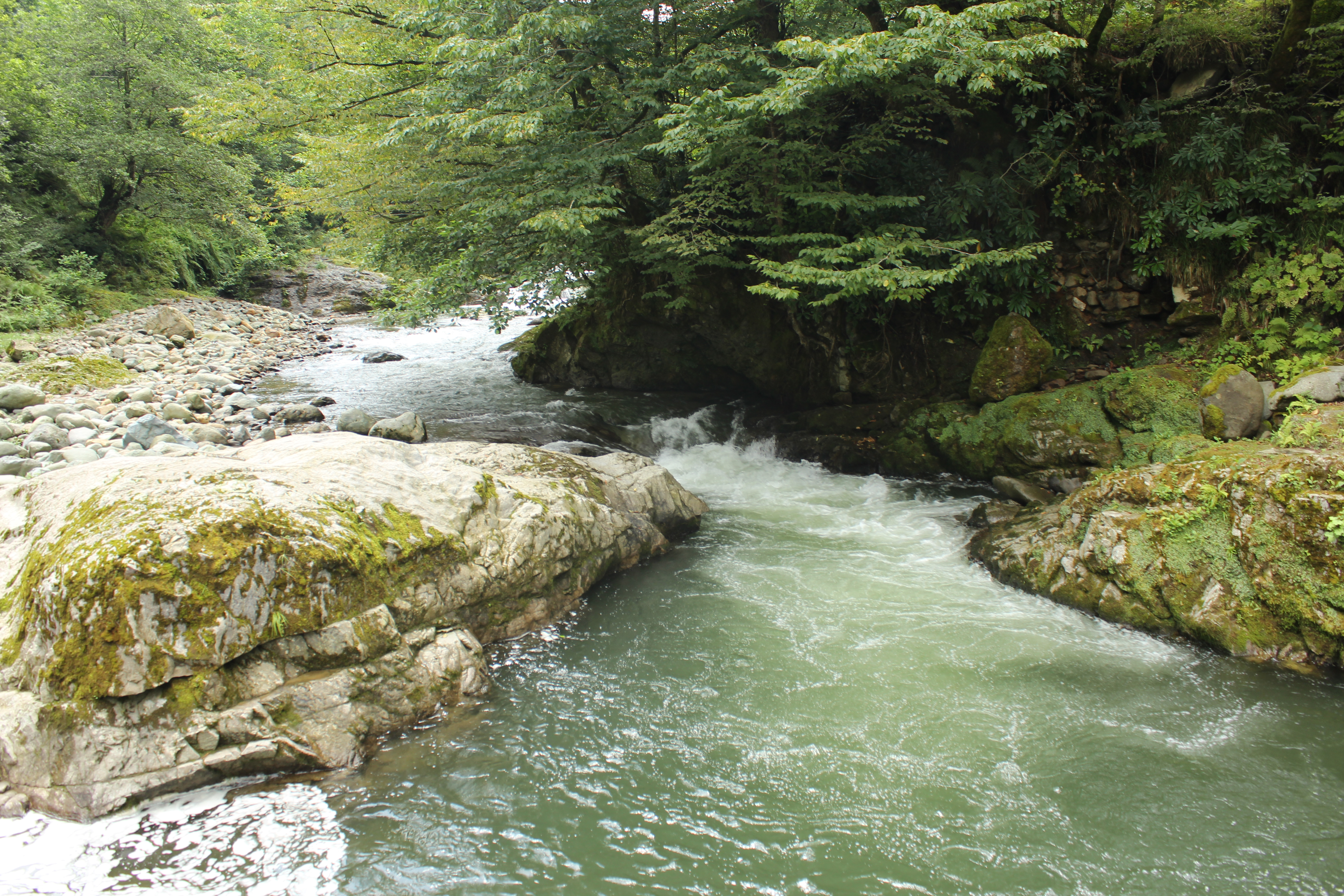 სარეკრეაციო ადგილი ჩაქუხა მდინარე ბჟუჟზე